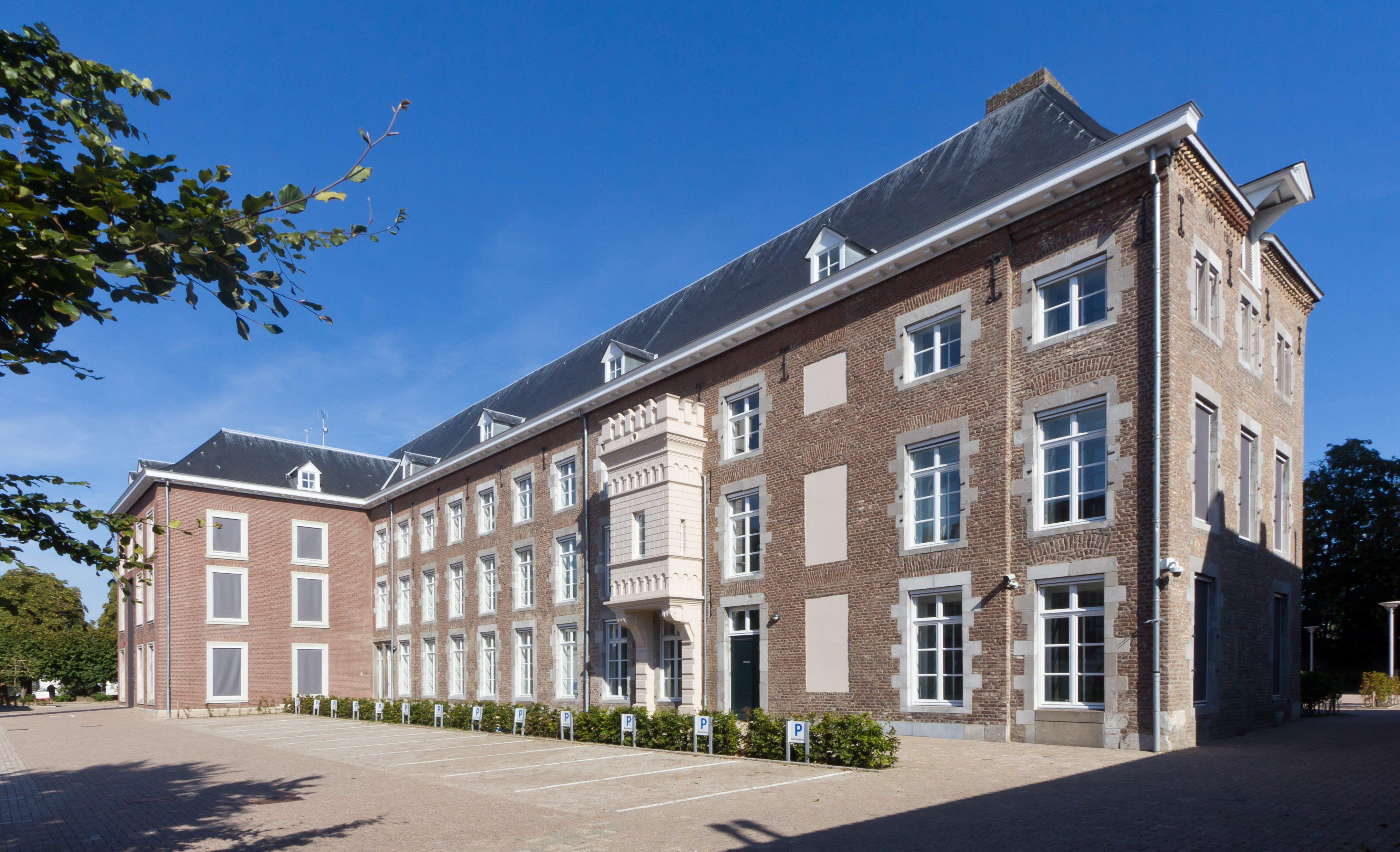 Roermond, Steegstraat 3 (Ondernemershuis, voormalig ursulinenklooster)